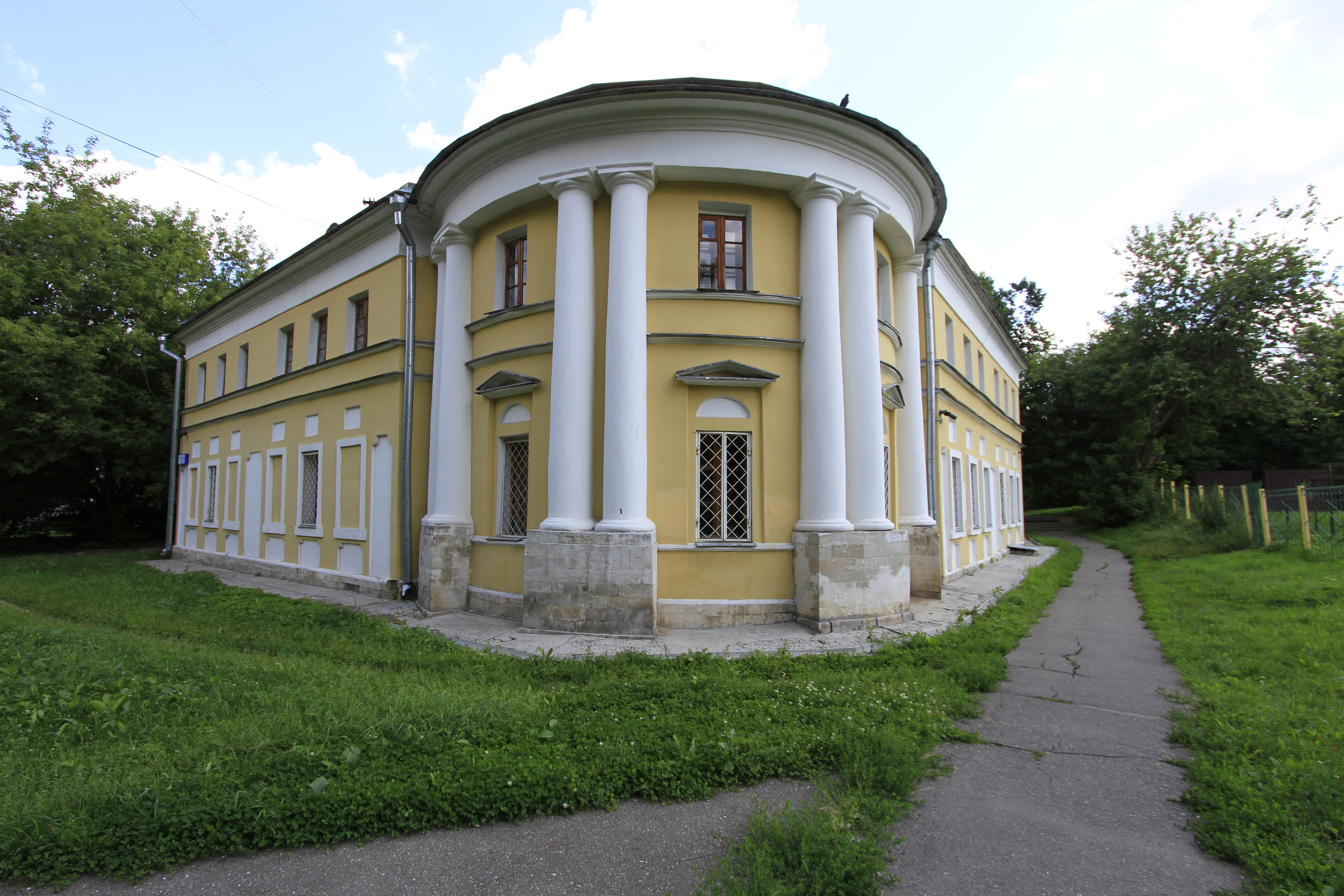 Флигель усадьбы Бекетовых «Зюзино» (Москва, Перекопская улица, 7, 9)